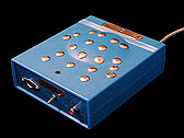 Sebuah alat untuk mendeteksi aura melalui telapak tangan.